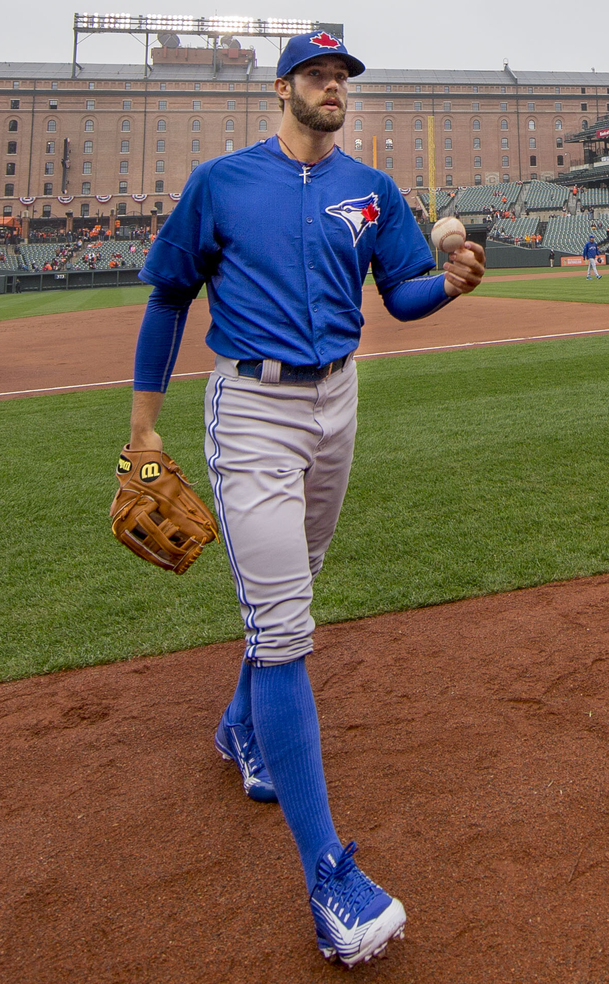 Daniel Norris